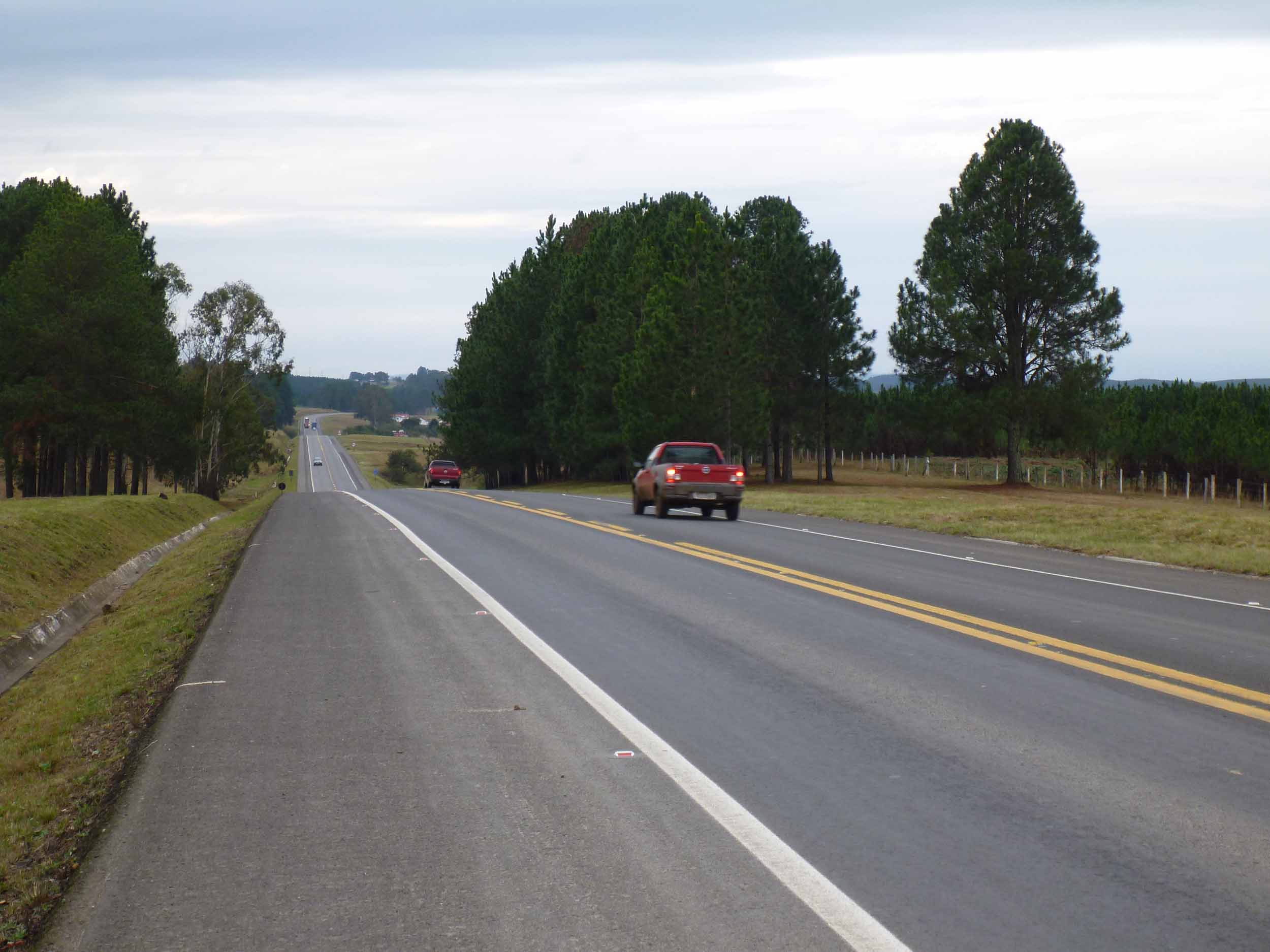 Pesquisa CNT de Rodovias 2012 - Foto: Arquivo/CNT